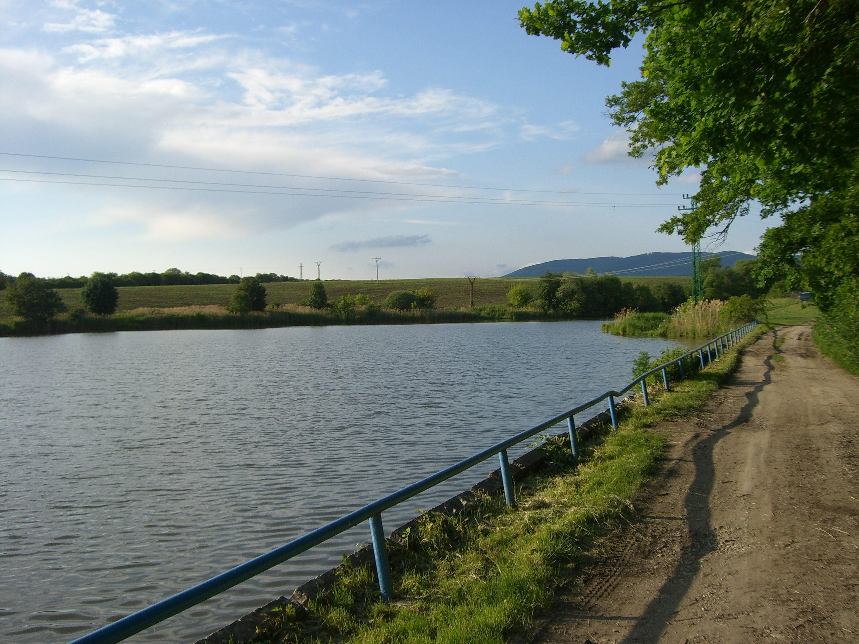 Nemčiňianska priehrada (reservoir), rybník Nemčiňany, umelá vodná nádrž Nemčiňany